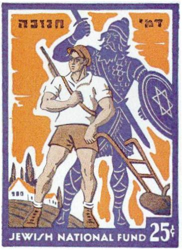 בול של הקרן הקיימת לישראל שיצא בארצות הברית בשנת 1938